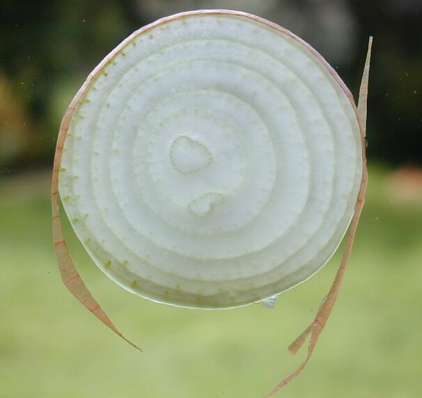 One half onion